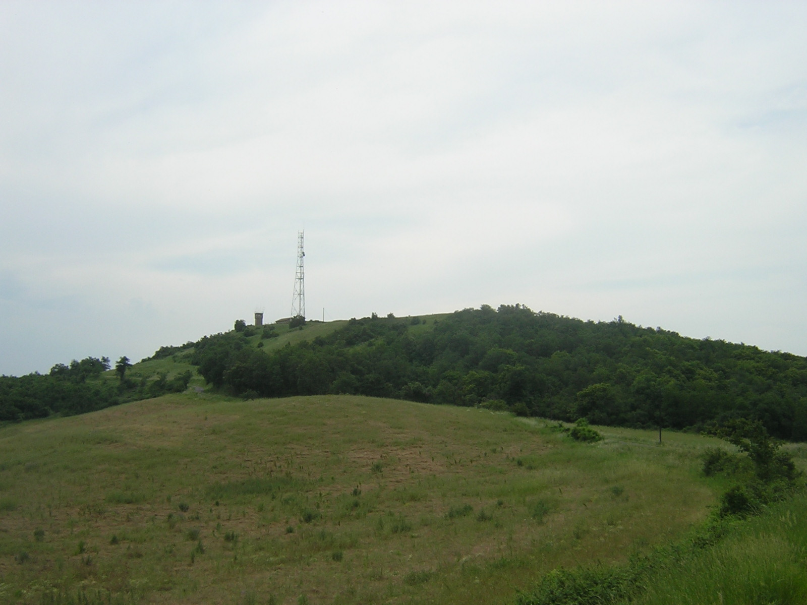 Fait per ieu scArf